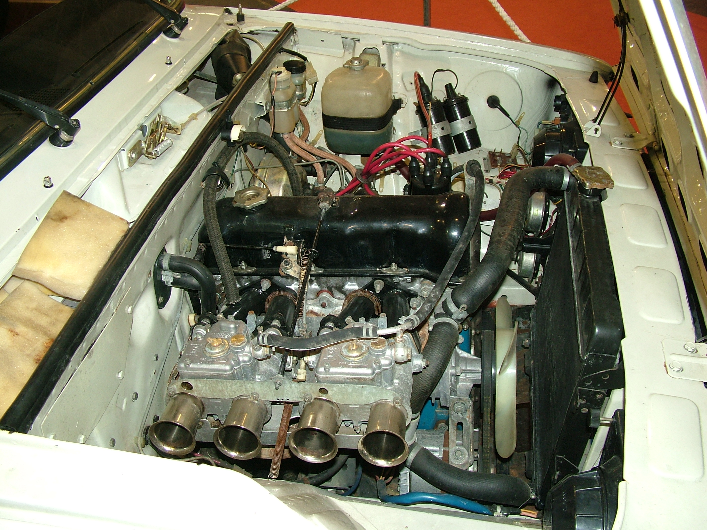 Lada VFTS, 1982 motor